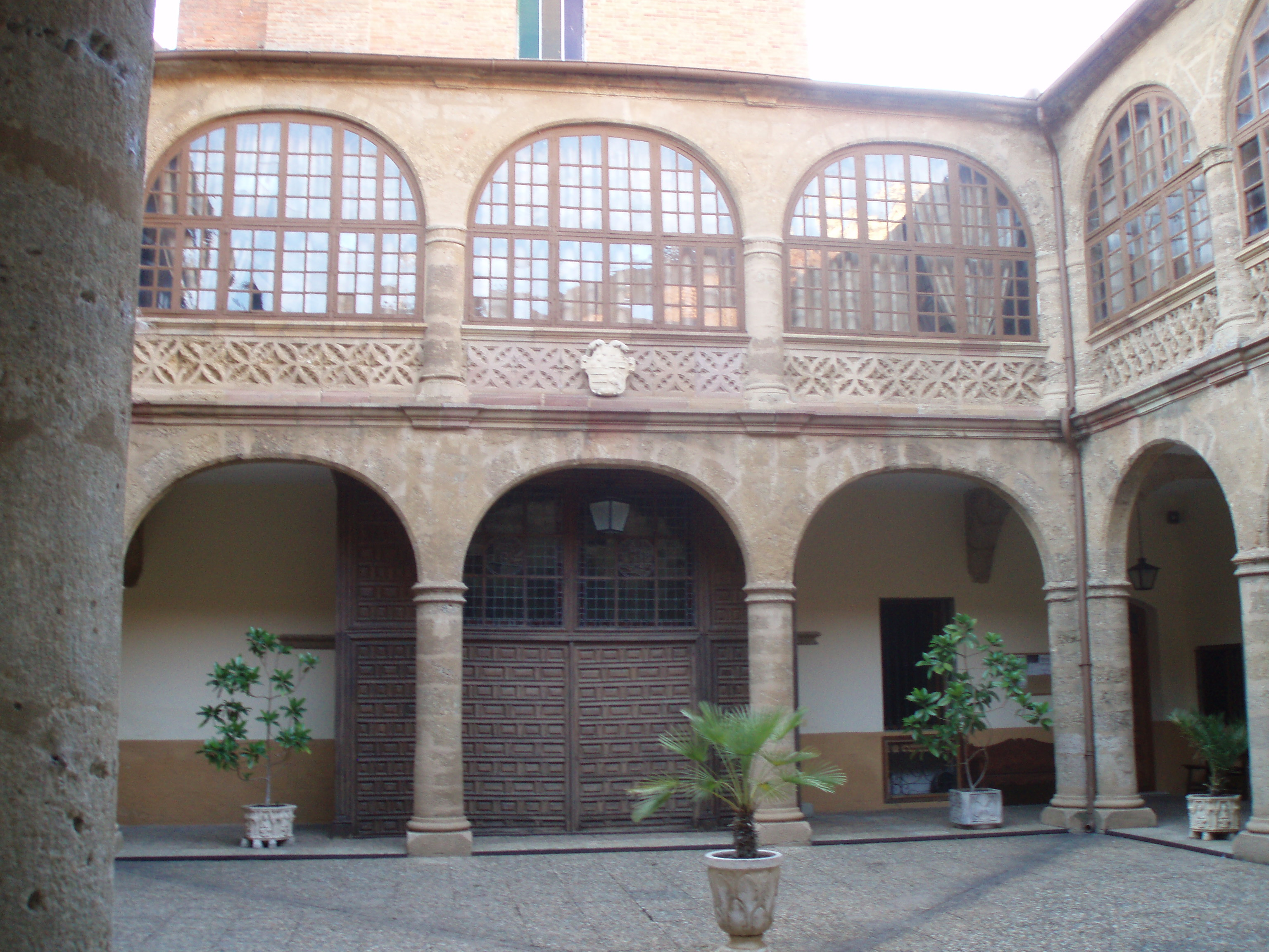 Edificio de la ciudad de Benavente, en la provincia de Zamora. (España).